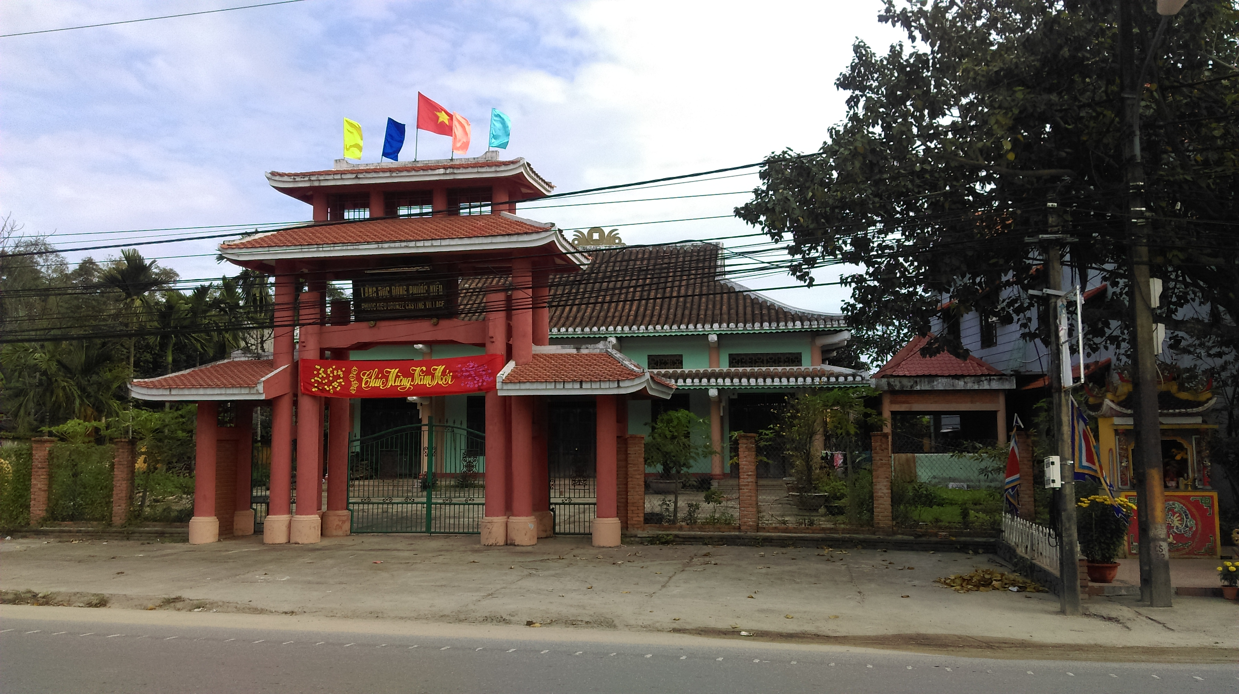 Làng Đúc đồng Phước Kiều, Điện Bàn, Quảng Nam